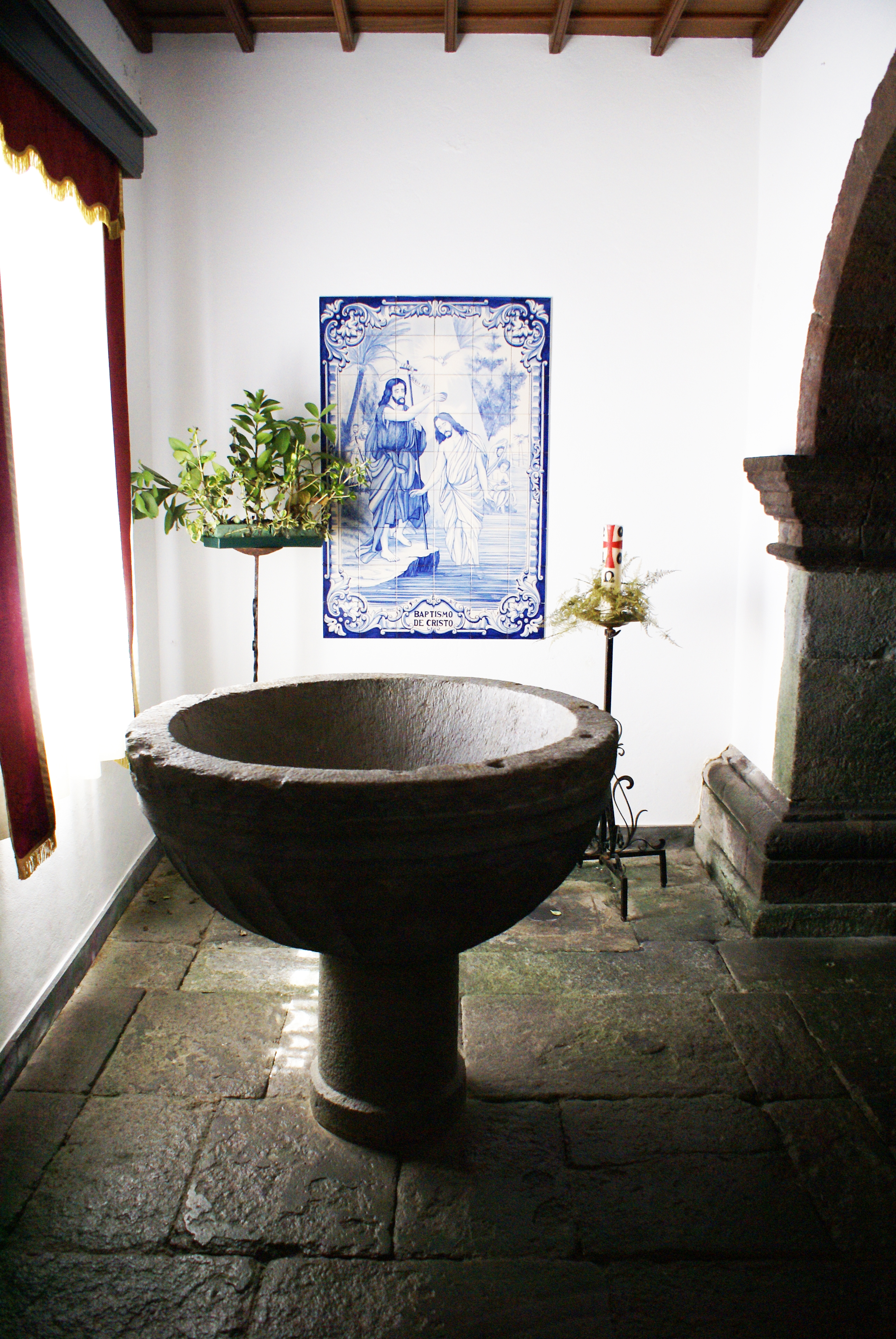 Igreja de Nossa Senhora da Luz, pia batismal, Santa Cruz da Graciosa, ilha Graciosa, Açores, Portugal